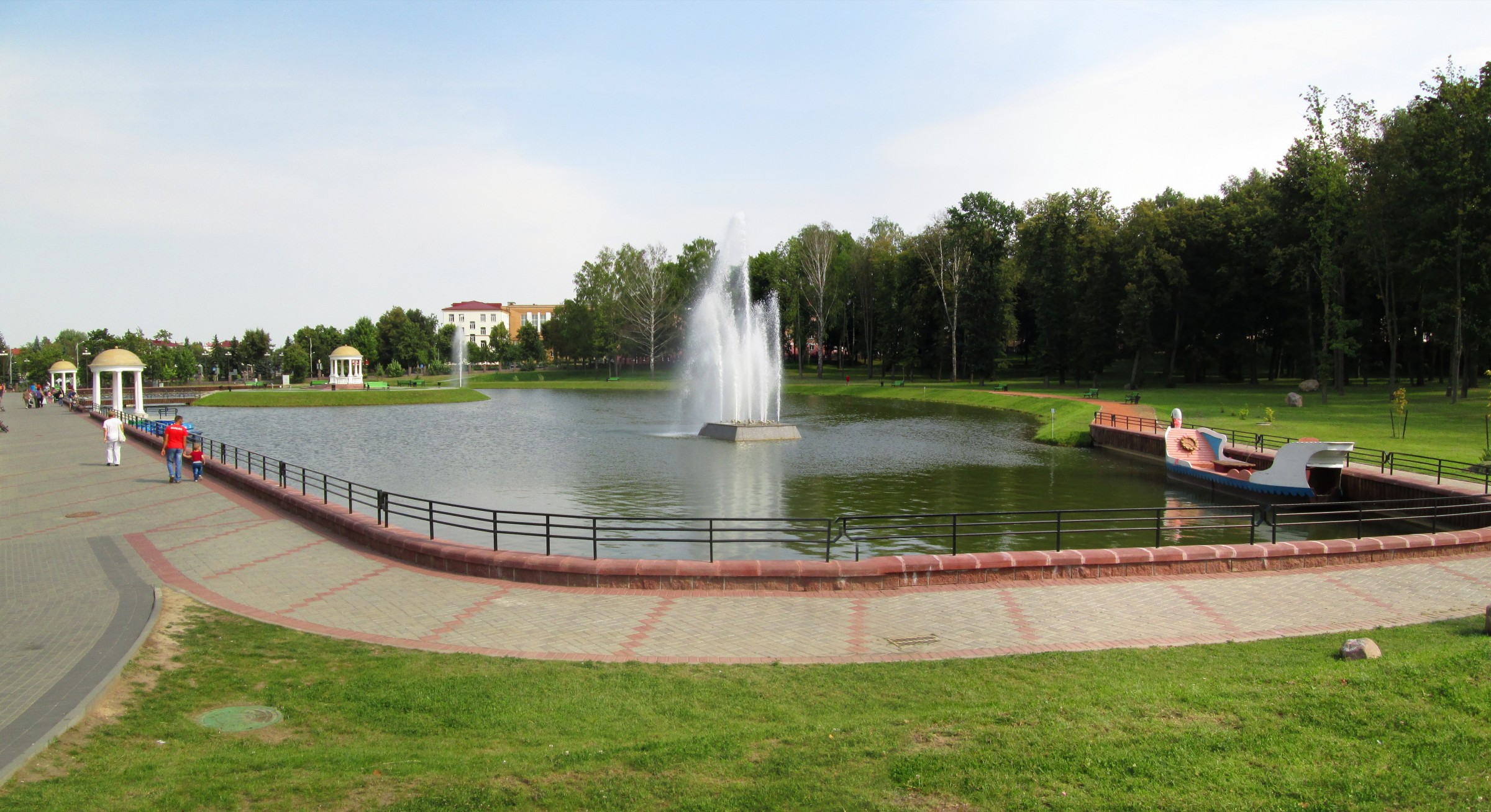 Maladzyechna, Belarus